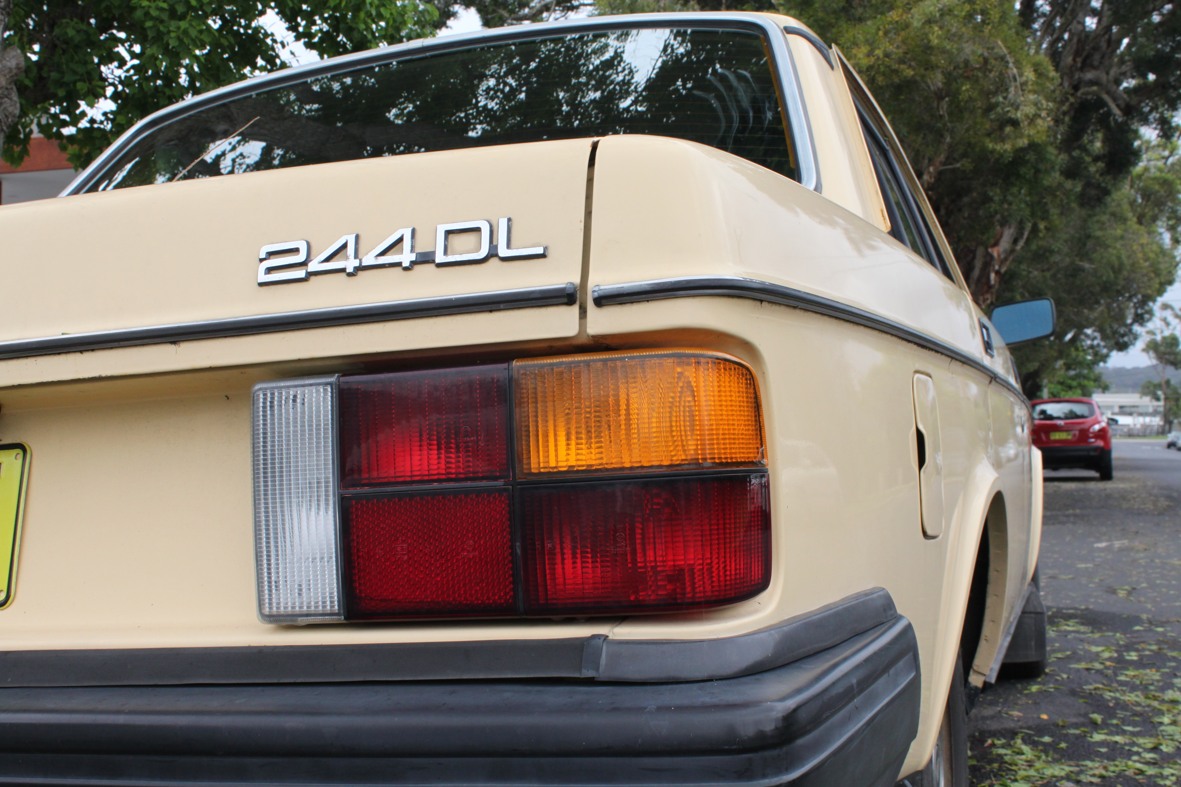 Volvo 244DL